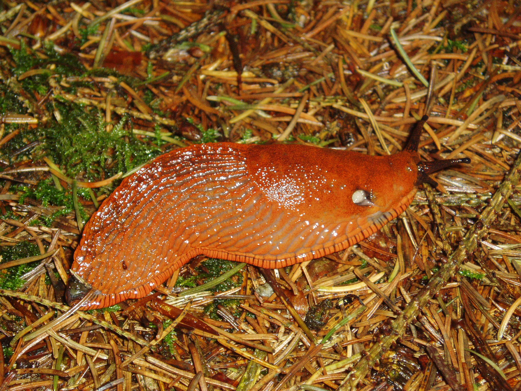 Rød skogsnegl (Arion rufus L.) fotografert i Jylland, Danmark